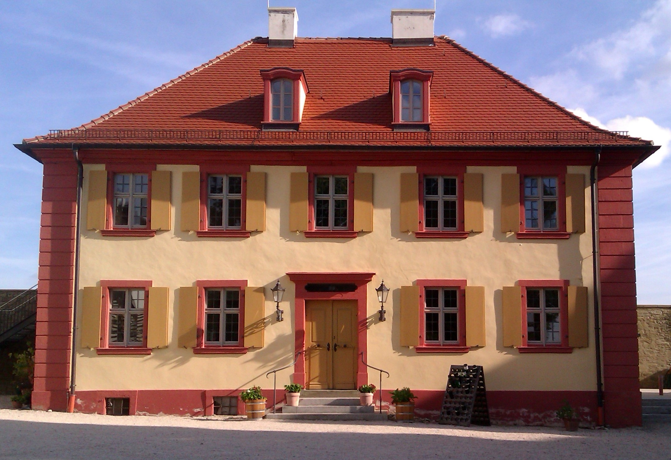 Barockes Amtshaus von Schloss Frankenberg im Steigerwald